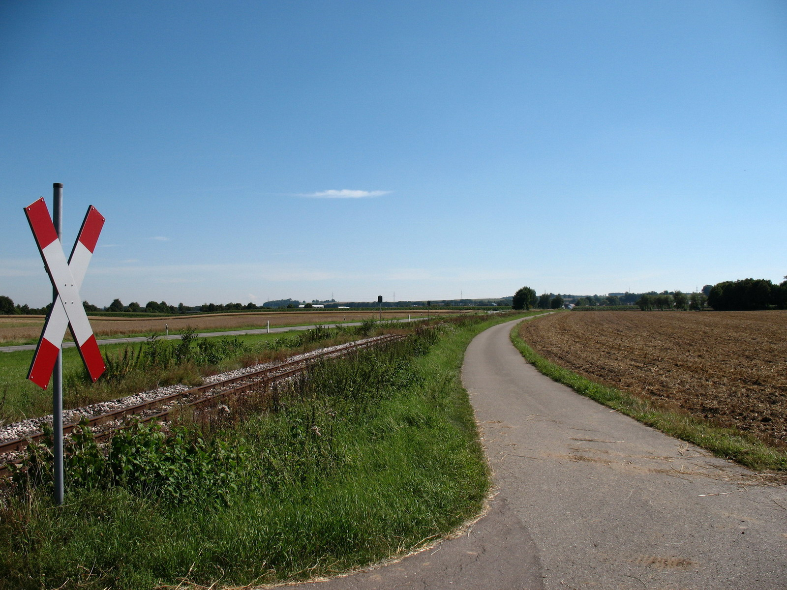 Der Öchsle-Radweg kurz vor Äpfingen. Hier laufen Radweg, Schienen und Landesstraße 267 parallel.